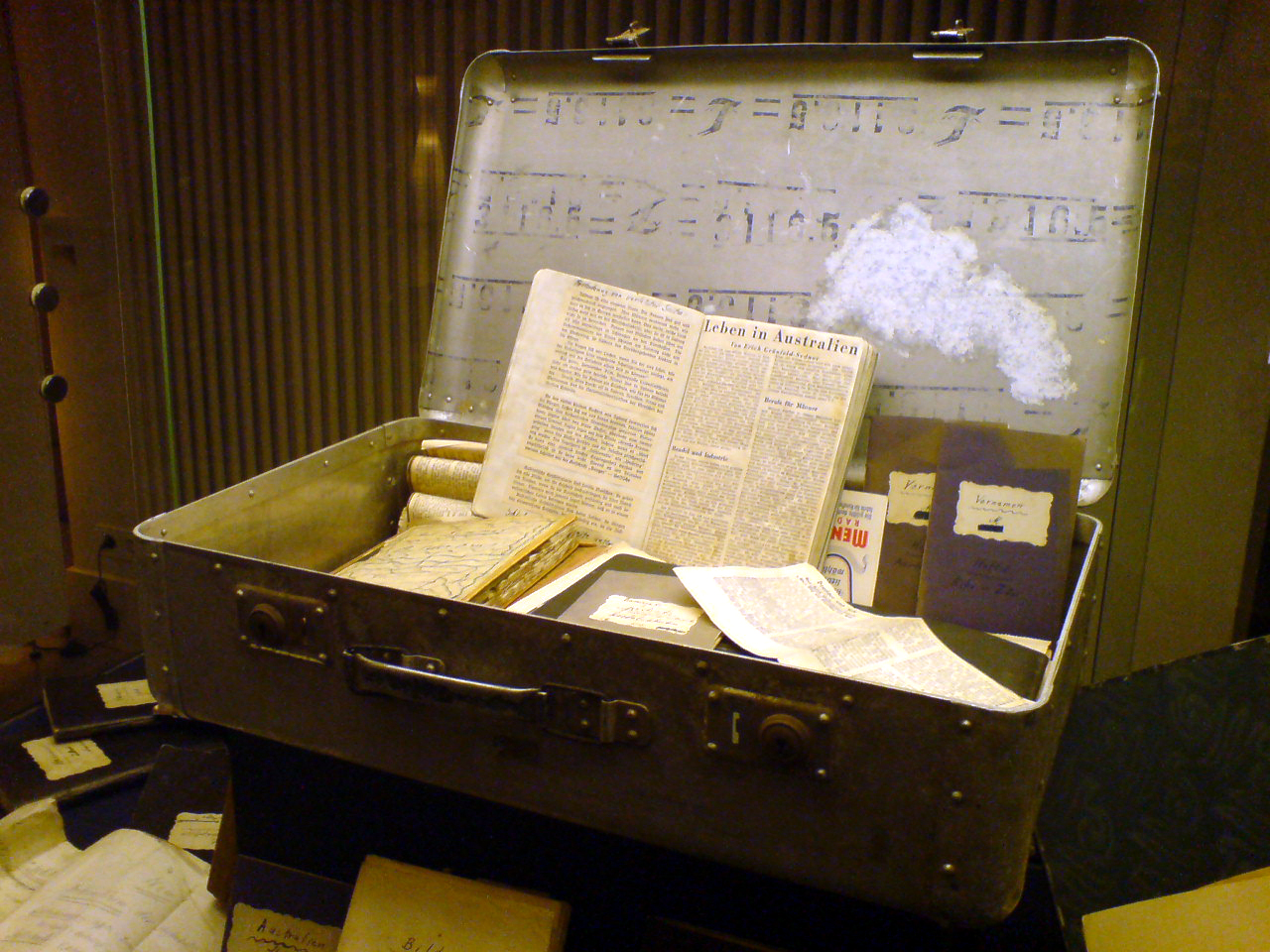 Exponat eines wohl selbstgefertigten Koffers aus Leichtmetall bzw. Aluminium aus Materialien der Vereinigten Leichtmetallwerke VLM in Hannover mit persönlichen Utensilien des Juden Norbert Kronenberg. Vor seinem letzten Wohnsitz in der Deisterstraße 23 in Hannover-Linden wurde ein Stolperstein verlegt.